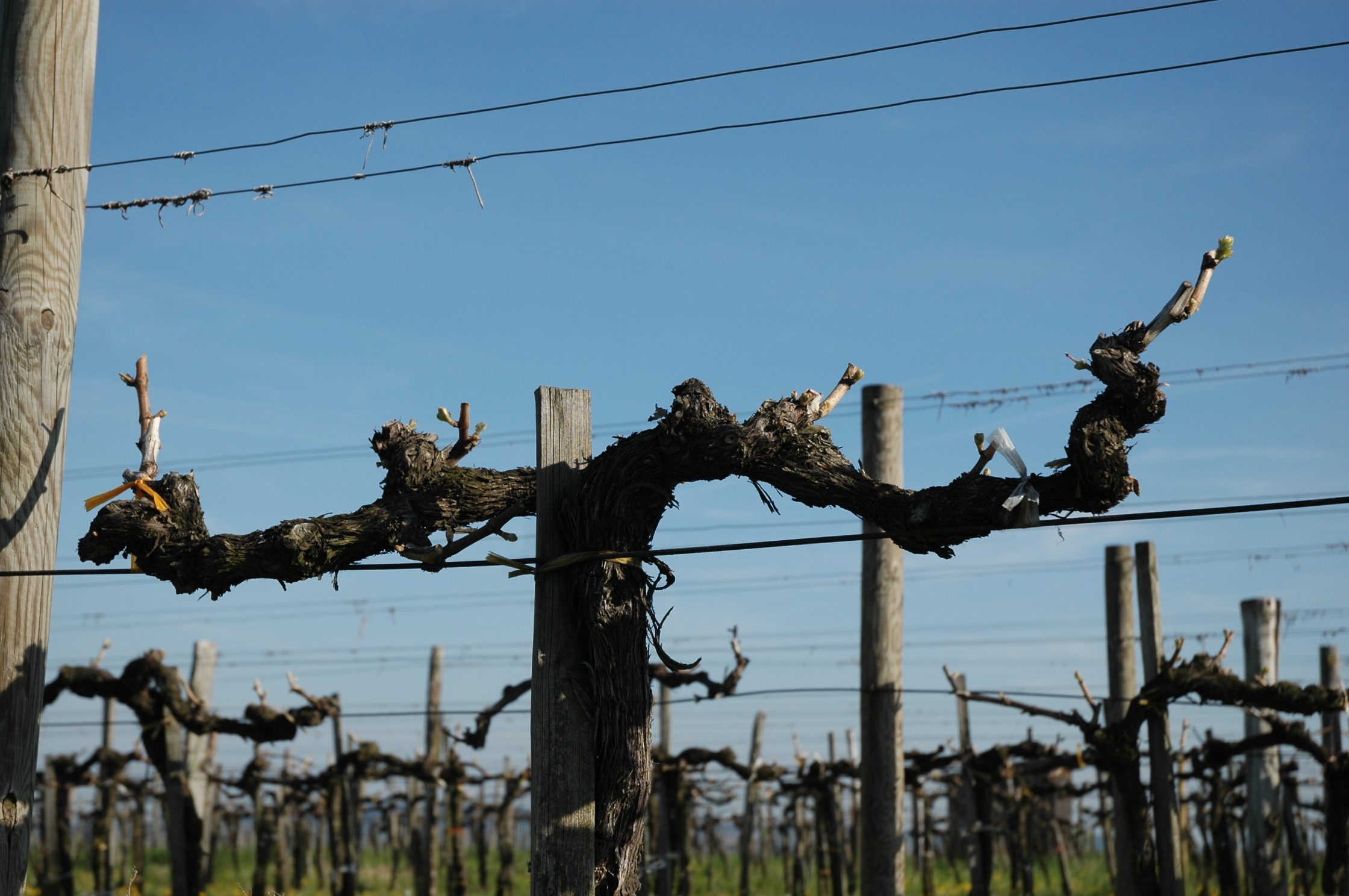 Hochkultur mit Kordon u. Zapfenschnitt